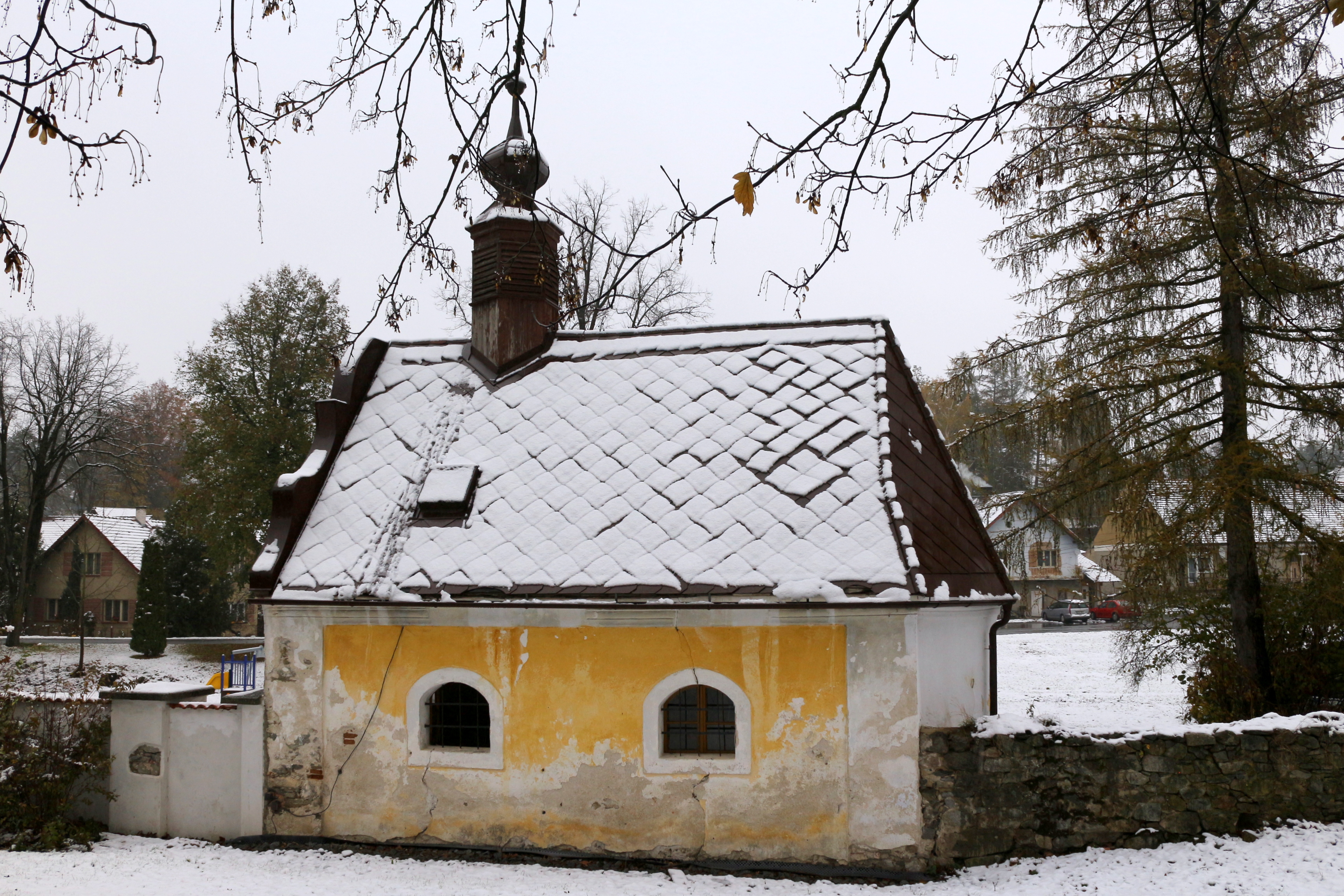 Zámecká kaple sv. Václava v Jindřichovicích